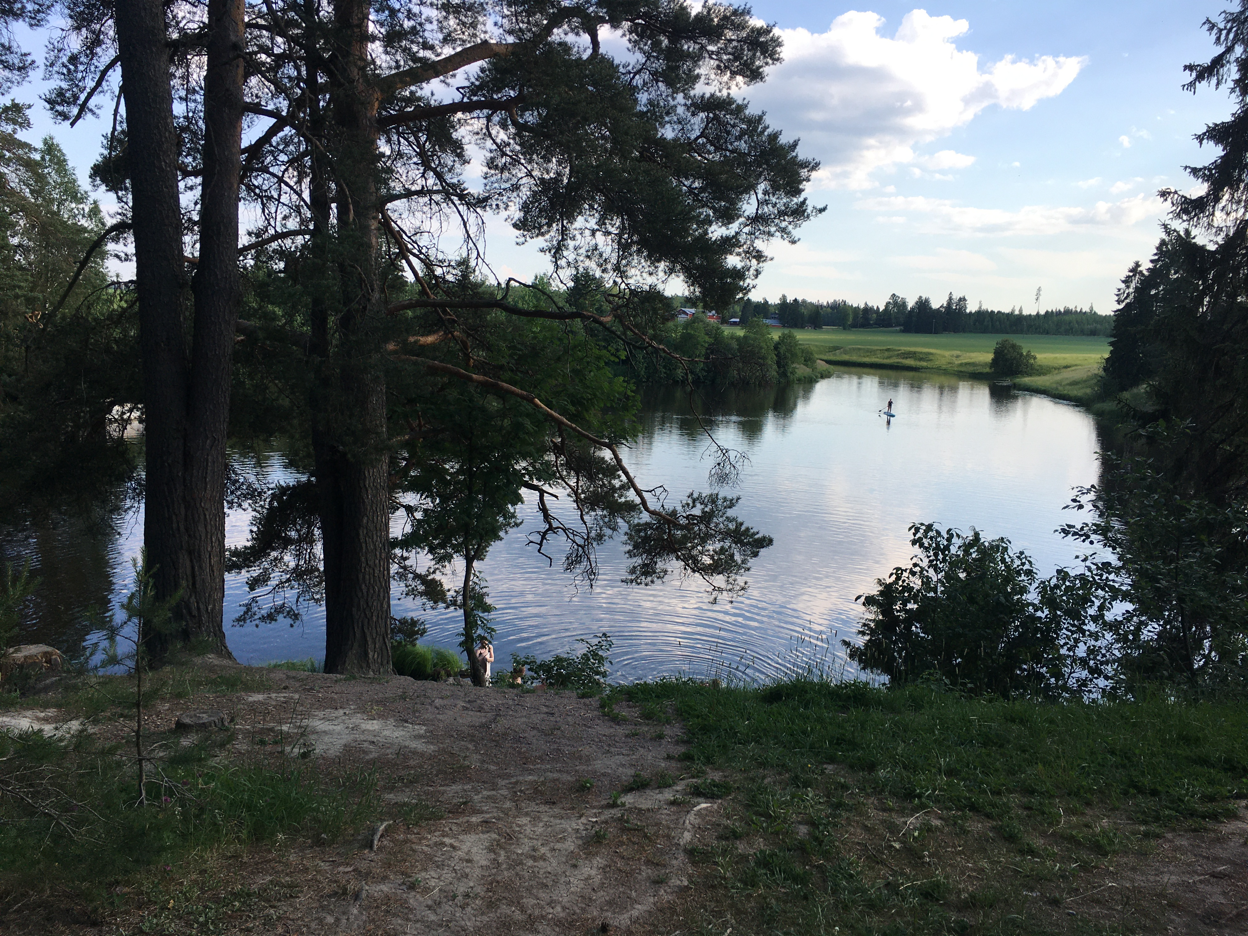 Uimaranta laavu Numminen Mustijoki Nordbo